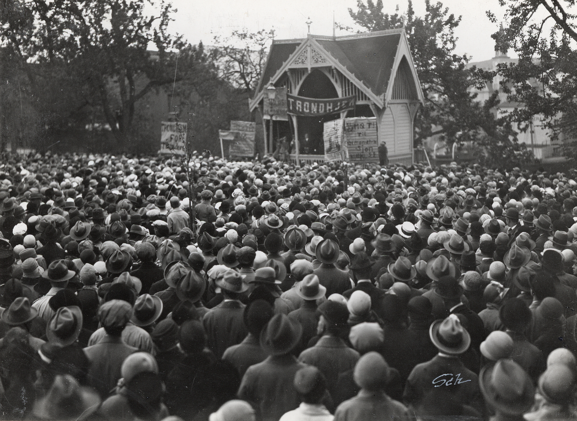 Format: Fotopositiv Dato / Date: 1929 Fotograf / Photographer: Schrøder Sted / Place: Kongens gate / Kjøpmannsgata,Trondheim Wikipedia: Nidaros Wikipedia: Rådhuset i Trondheim (gamle) Eier / Owner Institution: Trondheim byarkiv, The Municipal Archives of Trondheim Arkivreferanse / Archive reference: Tor.H45.F9998 Merknad: Rådhusplassen var en betegnelse på den østre delen av Kongens gate, ut mot Kjøpmannsgata, mellom Brannstasjonen, Folkebiblioteket, Frimurerlogen og Gamle Norges Bank. Plassen fikk sitt navn etter det gamle Råduset som lå der Folkebibloteket ligger i dag. Paviljongen vi ser på bildet ble vanligvis benyttet av Brigademusikken. (Trondheim byleksikon, 2008).